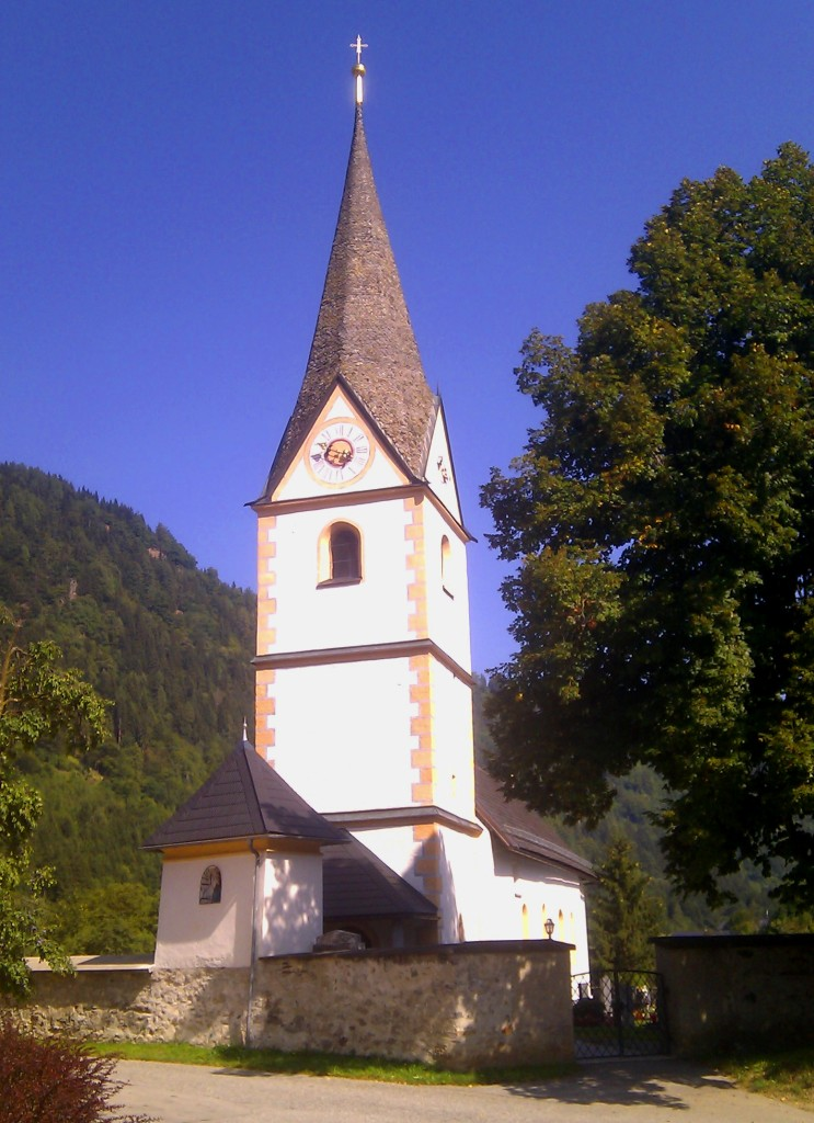 Pfarrkirche Klein Sankt Veit, Völkermarkt